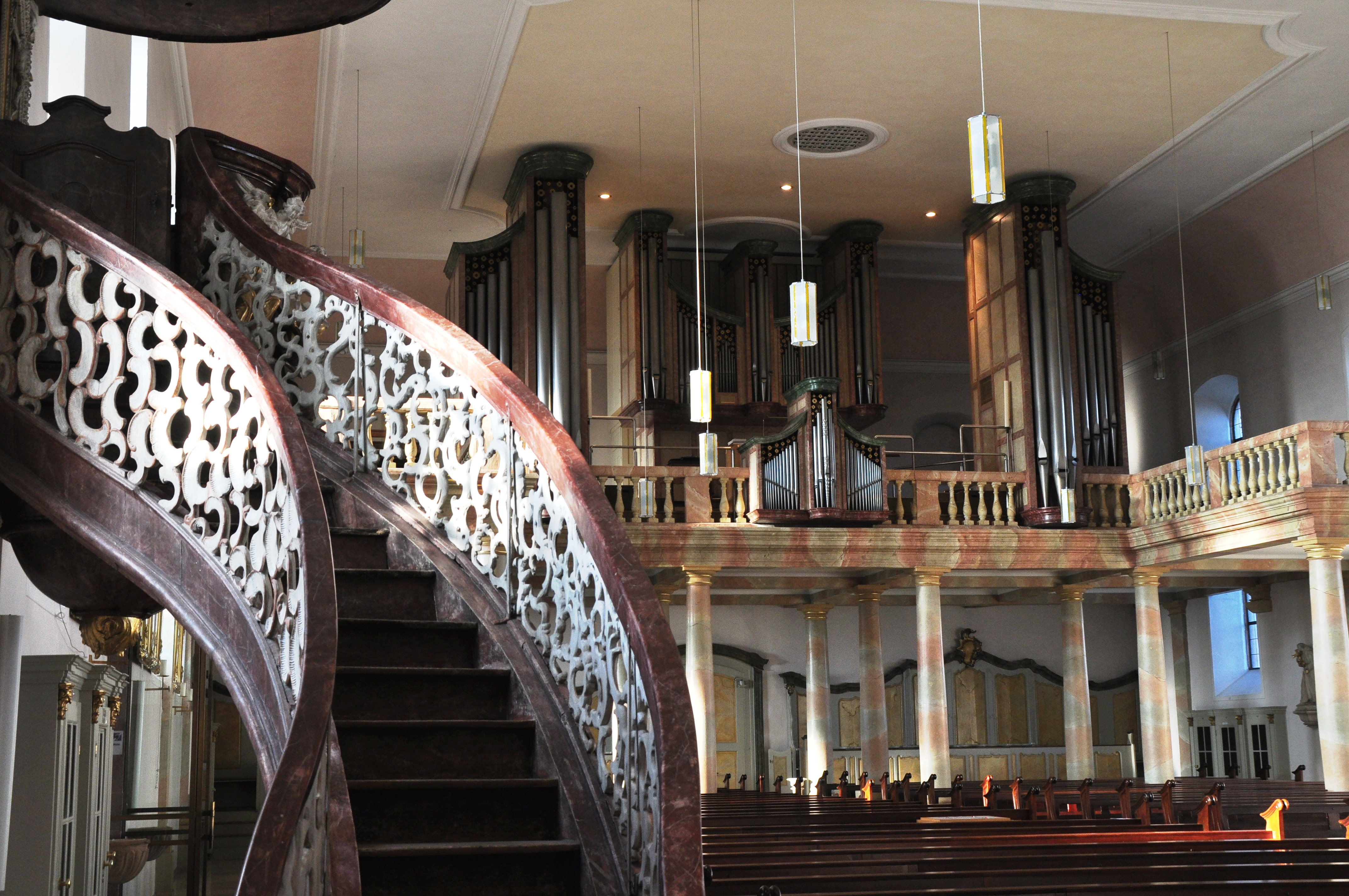 Geschwungener Aufgang zur Rokoko-Kanzel, Kath. Pfarrkirche St. Maria Himmelfahrt Herxheim